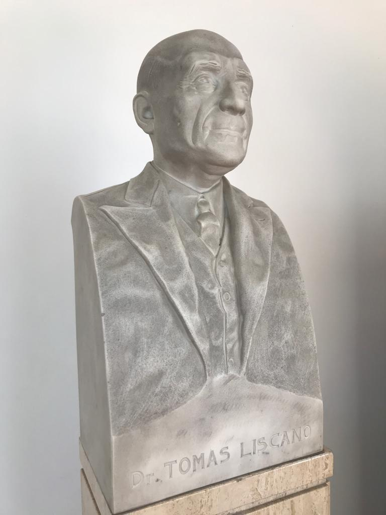 Busto del jurista Tomás Liscano en el Palacio de las Academias de Caracas